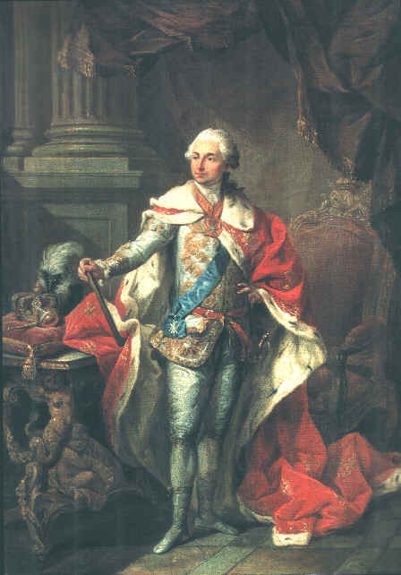 Een 18e-eeuws staatsieportret van Stanislaw August Poniatowski (rond 1780)